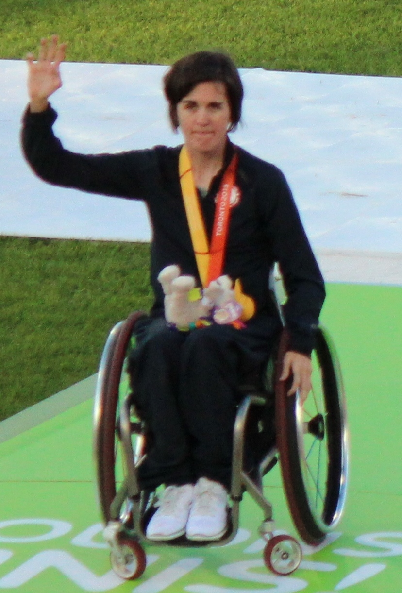 Kerri Morgan, 2015 Parapan Americans